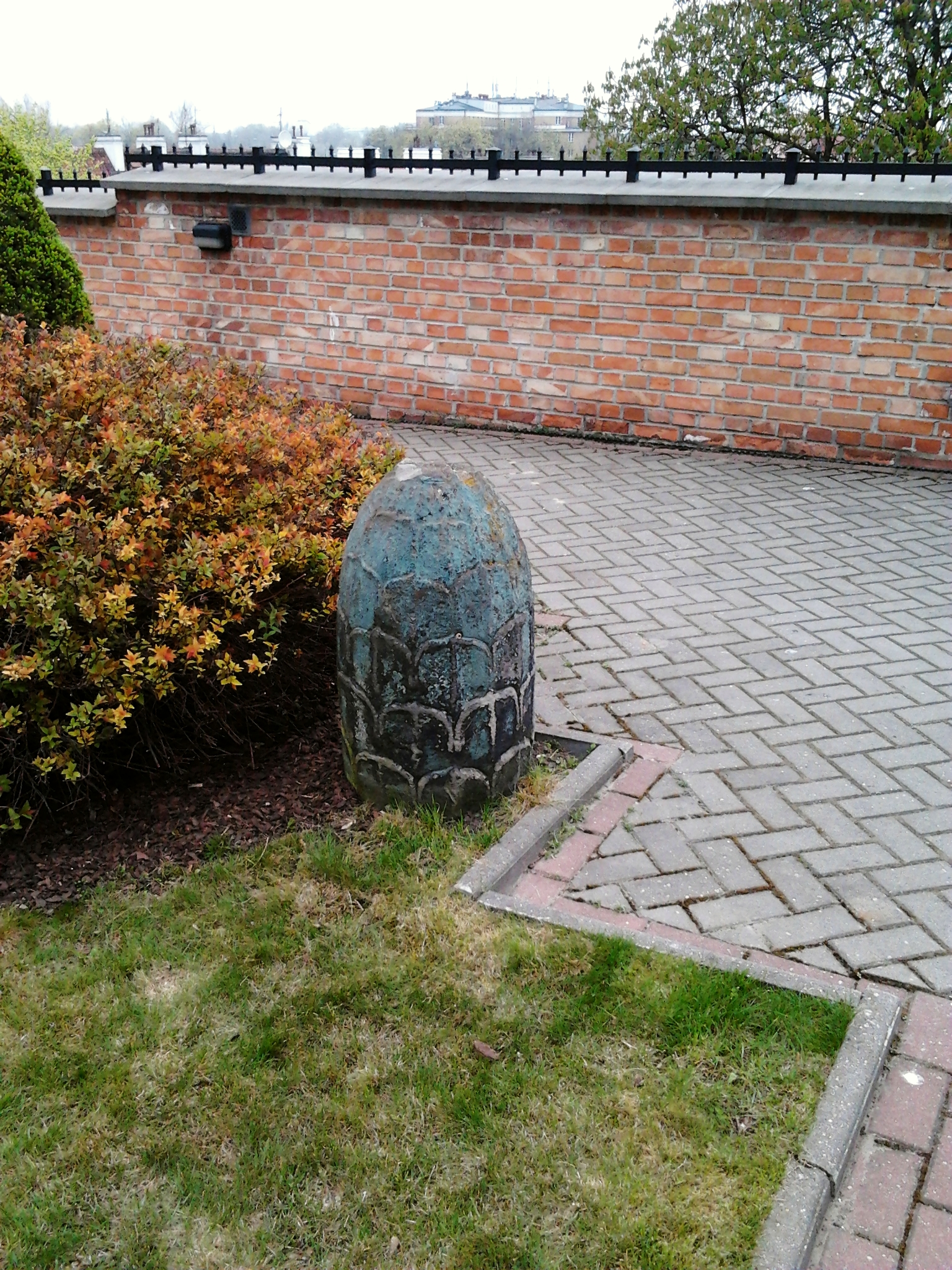 Remnants of the Kazanowski Palace in Warsaw.label QS:Len,"Remnants of the Kazanowski Palace in Warsaw." label QS:Lpl,"Pozostałości Pałacu Kazanowskich w Warszawie." label QS:Lfr,"Les vestiges du palais Kazanowski à Varsovie."